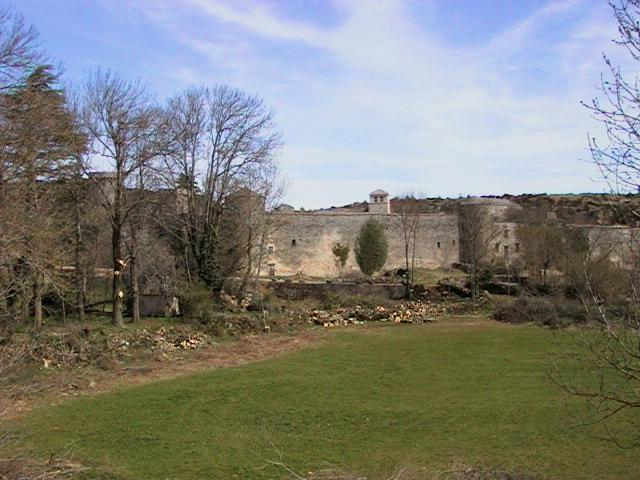 La Couvertoirade, France, walls